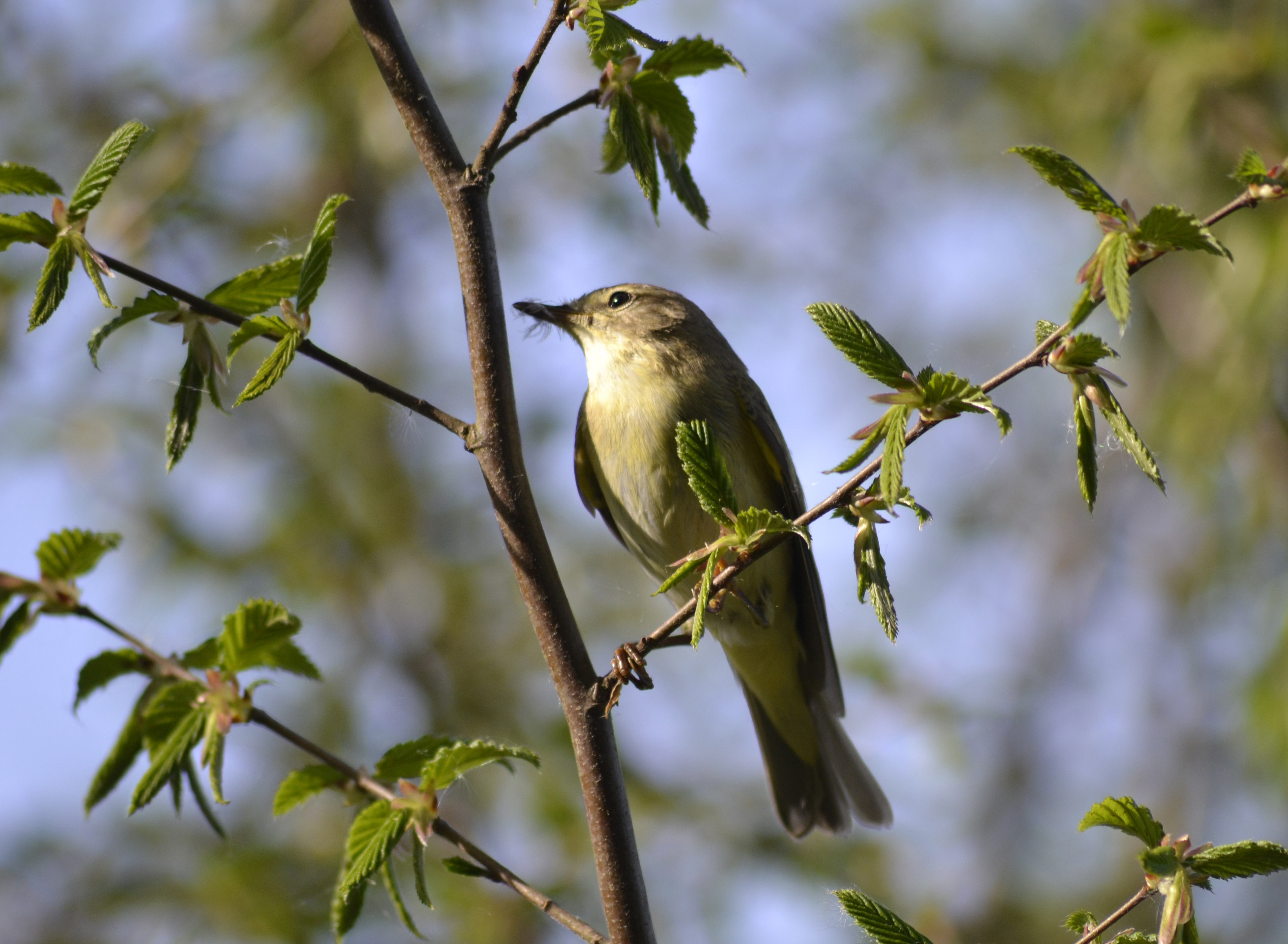 Fitis im Baum